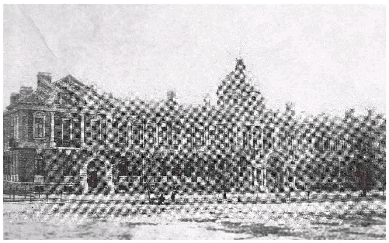 中文（中国大陆）: 1928年的京奉铁路管理局